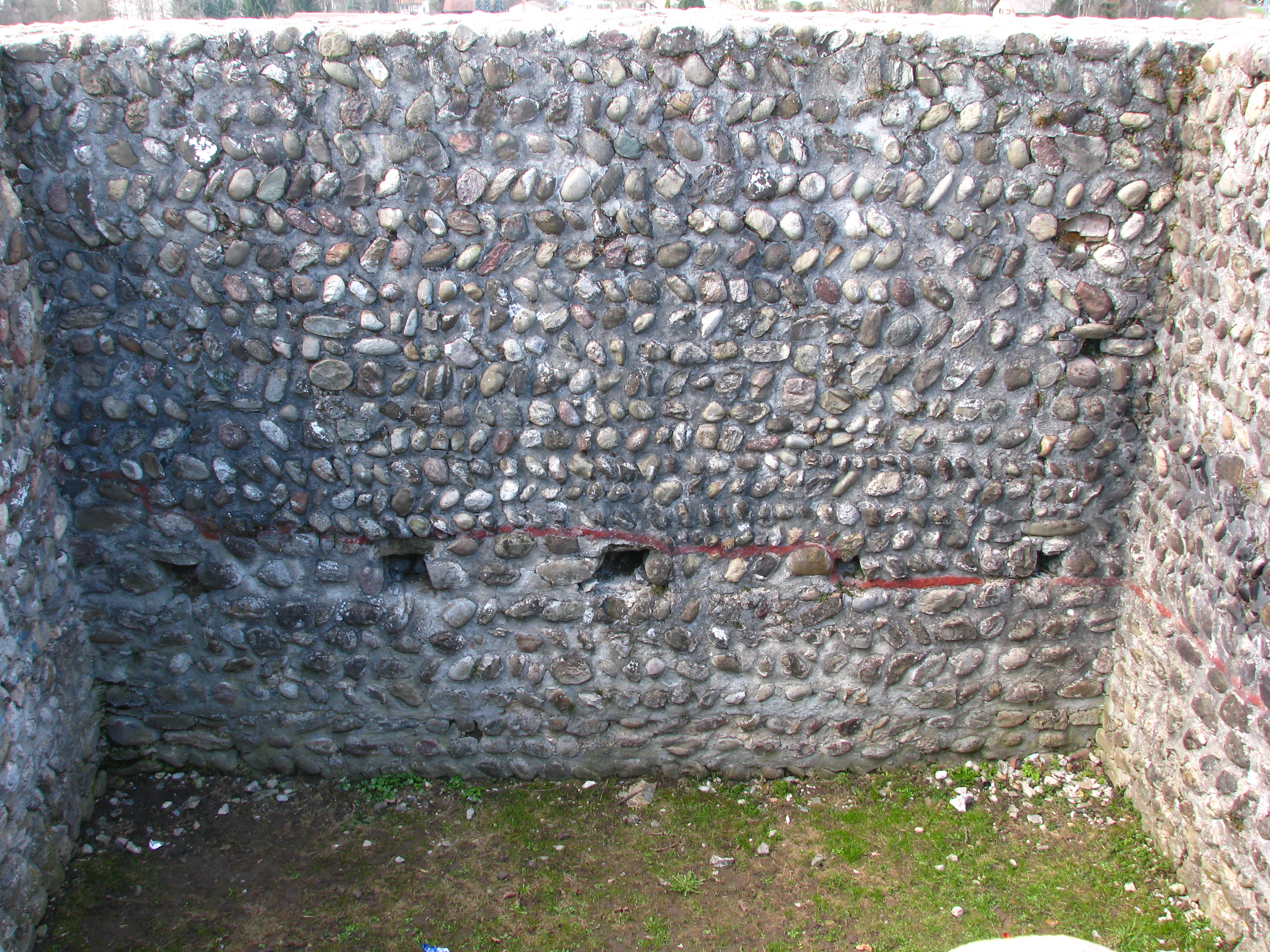 Römisches Kastell in Irgenhausen (Pfäffikon), Innenbereich des Nordturms